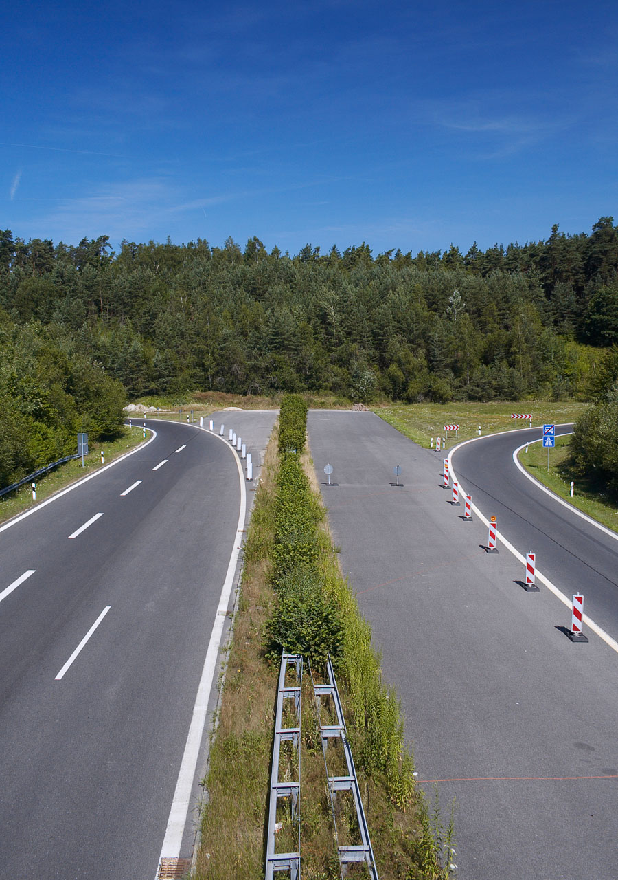 Die Bundesstraße 2 endet hier beim Autobahnkreuz 57 Schwabach-Roth an einer Anhöhe. Von hier sollte Sie nach ursprünglicher Planung als B2a durch die Rednitzniederungen zum Frankenschnellweg weitergeführt werden.